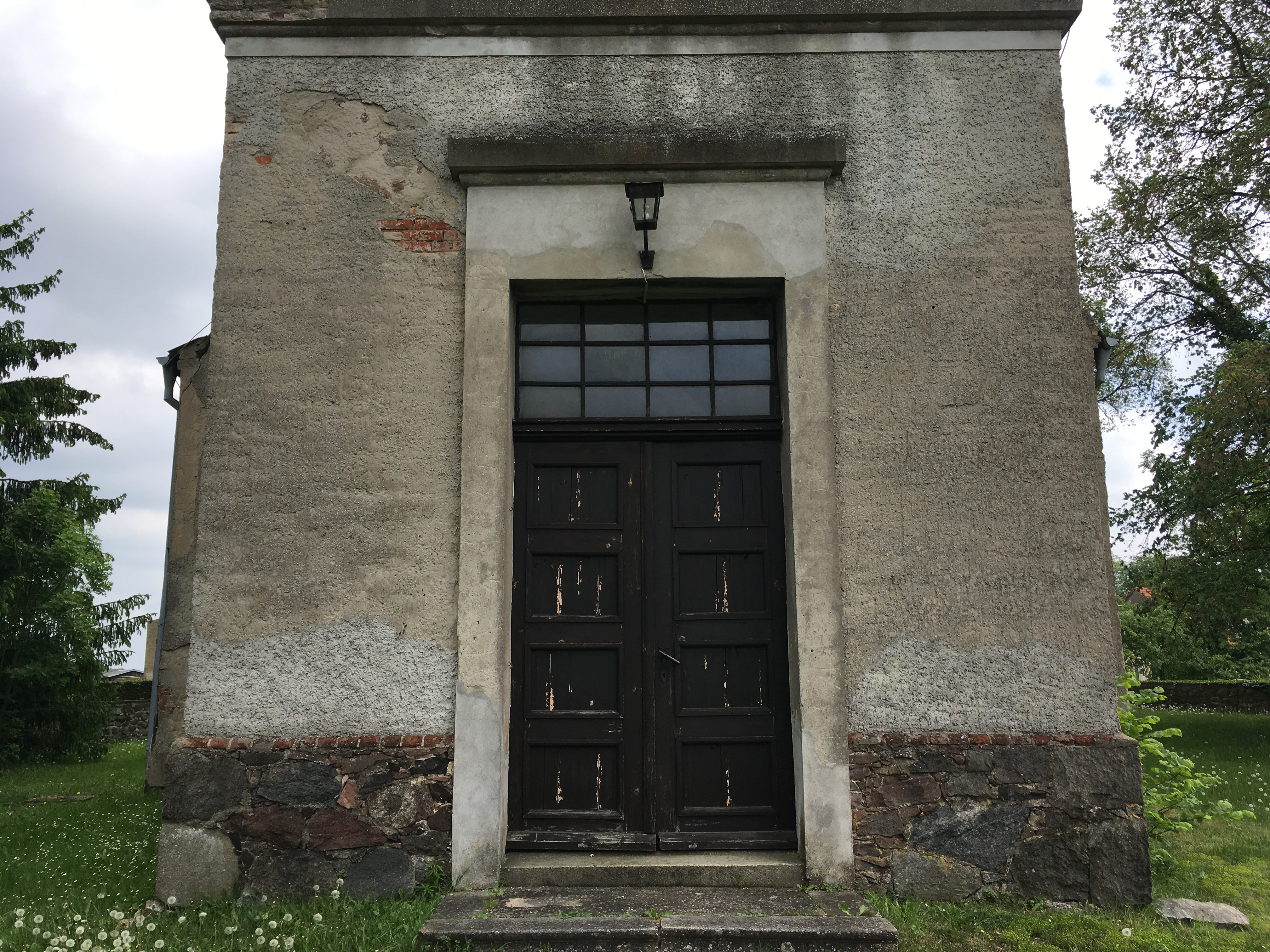 Die Dorfkirche Eggersdorf (Müncheberg) ist ein spätmittelalterlicher Bau aus Feld- und Backsteinen. Das Kirchenschiff ist auf seiner Westseite verkürzt. Experten vermuten daher, dass ursprünglich eine größere Anlage geplant war. Im Innern befindet sich unter anderem ein Kanzelaltar, den J. C. Martin im Jahr 1746 schuf.